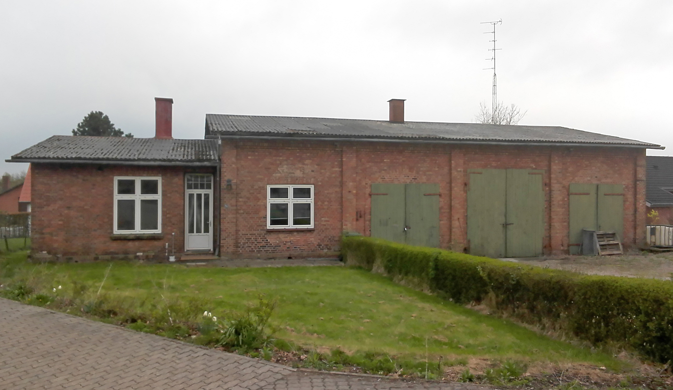 Arnum Remise